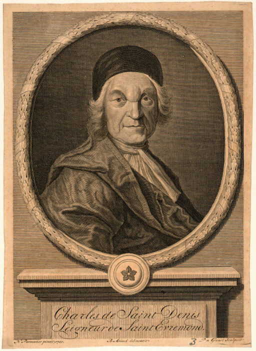 Portrait of Charles de Saint-Évremond (1610-1703)